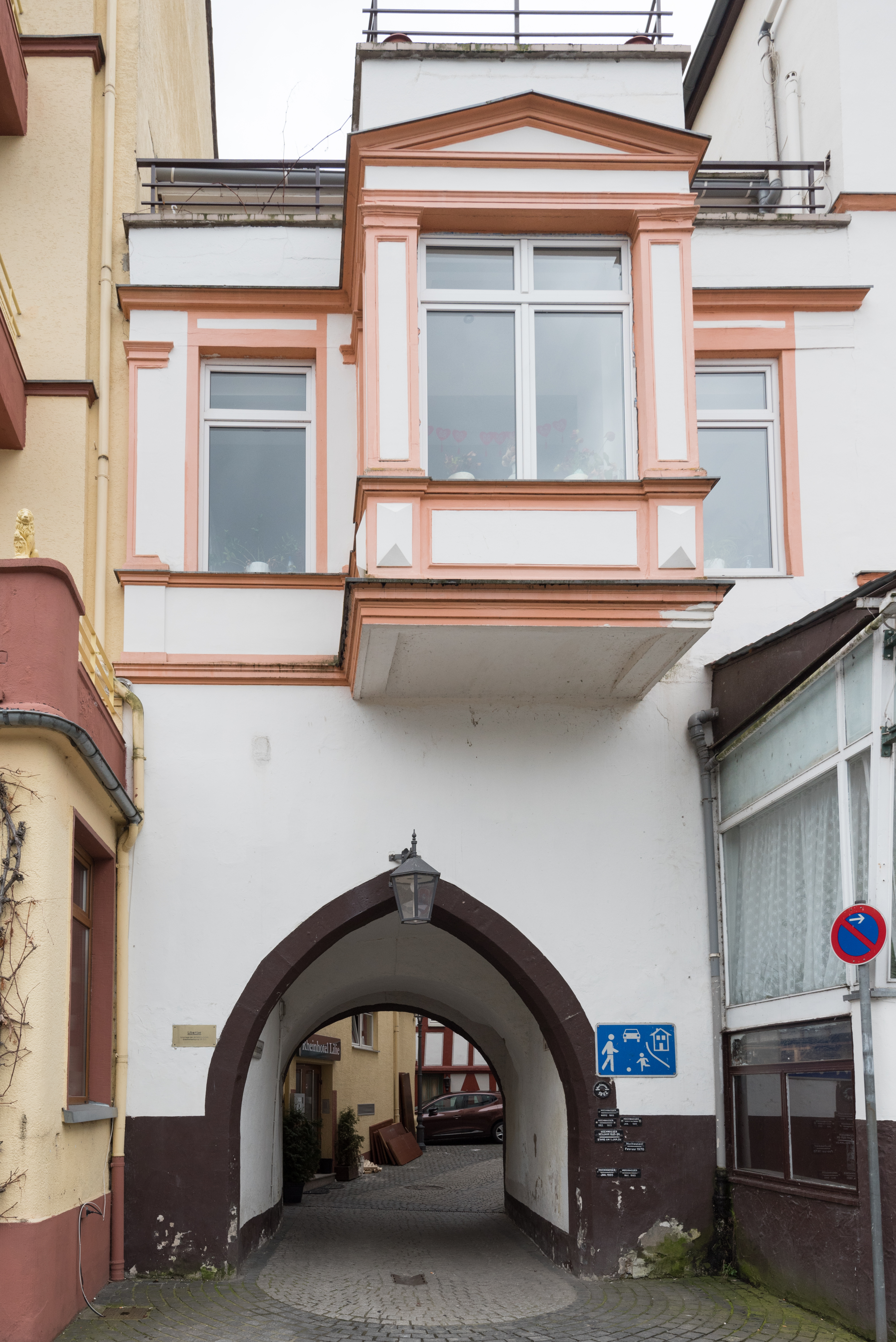 Boppard, Stadtbefestigung, Lilientor